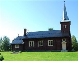 Plassen Kirke